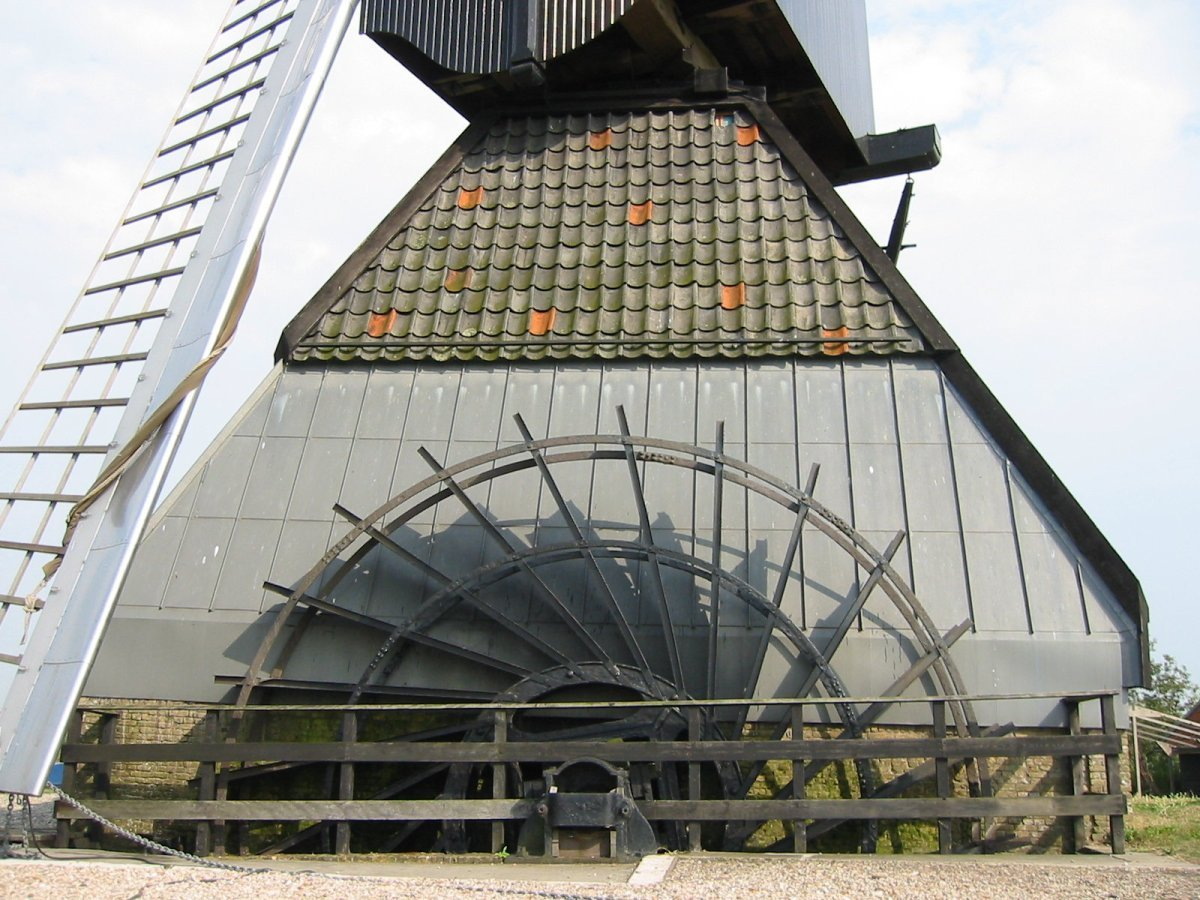 De Blokker/ Blokweerse Molen: Ondertoren met scheprad van wipmolen te Kinderdijk (opmerking: Foto gemaakt in het kader van het project Actualisering Monumentenregister (AMR).)